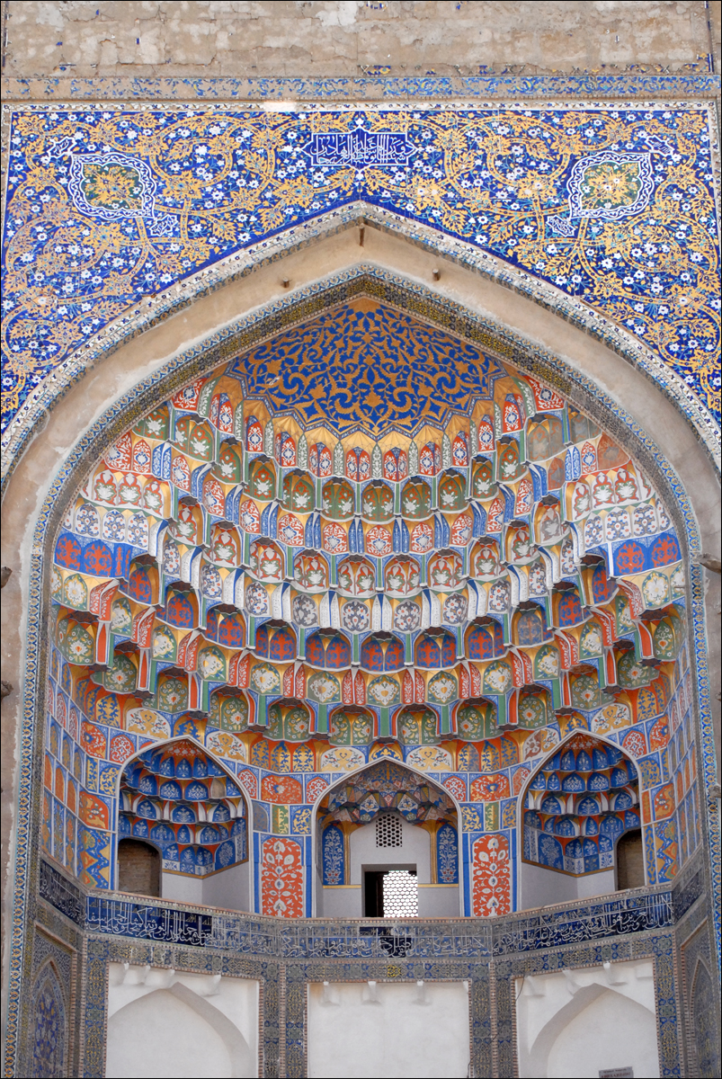 La médersa Abdoul Aziz Khan date de 1652. Ses décors, très riches et originaux, ont été restaurés avec vigueur, ce qui lui donne une allure de bâtiment neuf. C'est dommage mais le travail de restitution est néanmoins remarquable.